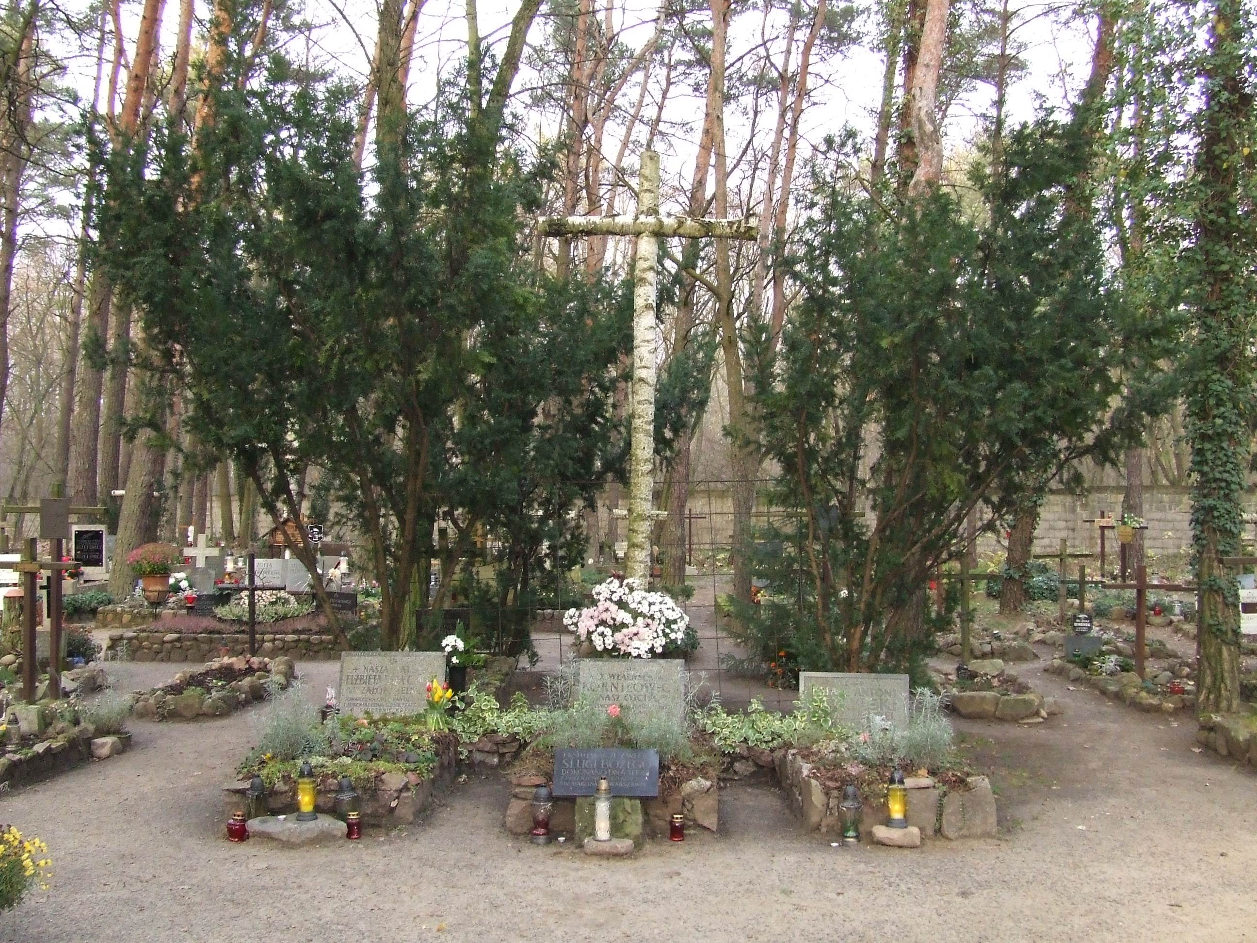 Grób ks. Korniłowicza, Cmentarz leśny, Laski